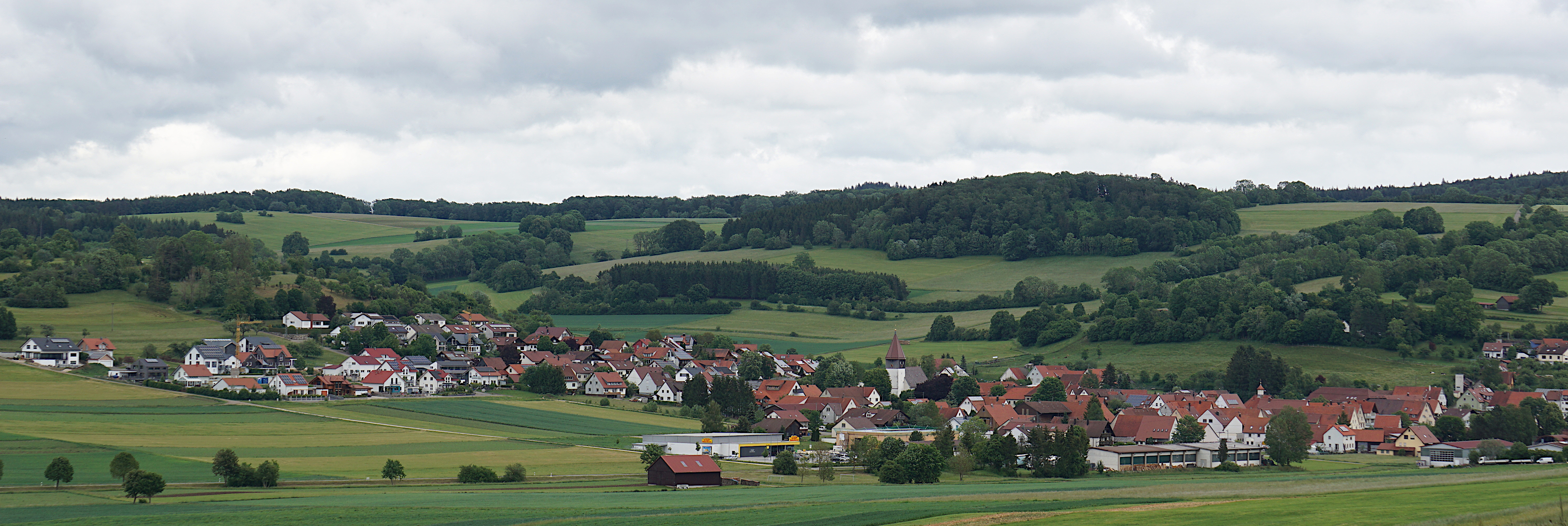 Gächingen vom Westen aus gesehen.